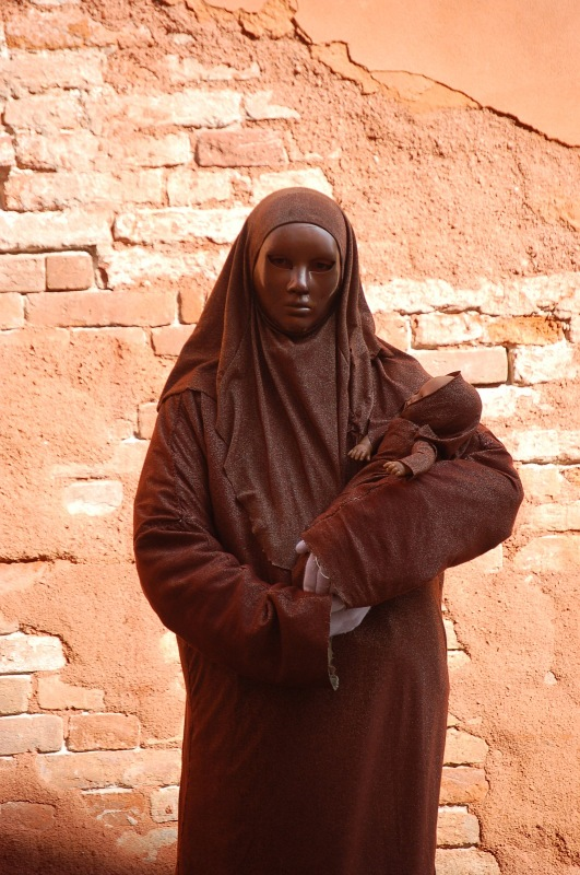 Original image description from the Deutsche Fotothek Als schwarze Madonna verkleidete Bettlerin, Stadtteil Cannaregio in einer Einkaufsstraße